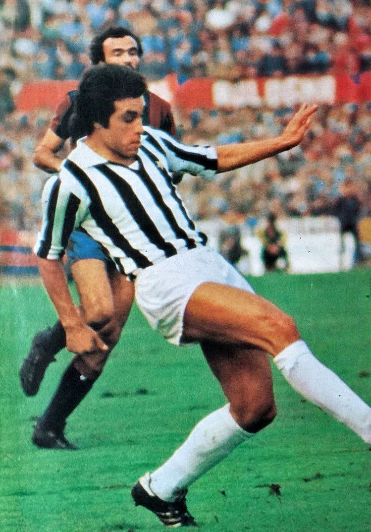 Bologna, stadio Comunale, 6 ottobre 1974. Il calciatore della Juventus, Franco Causio, in azione nella sconfitta esterna contro il Bologna (1-2) valevole per la 1ª giornata del campionato italiano di Serie A 1974-75.